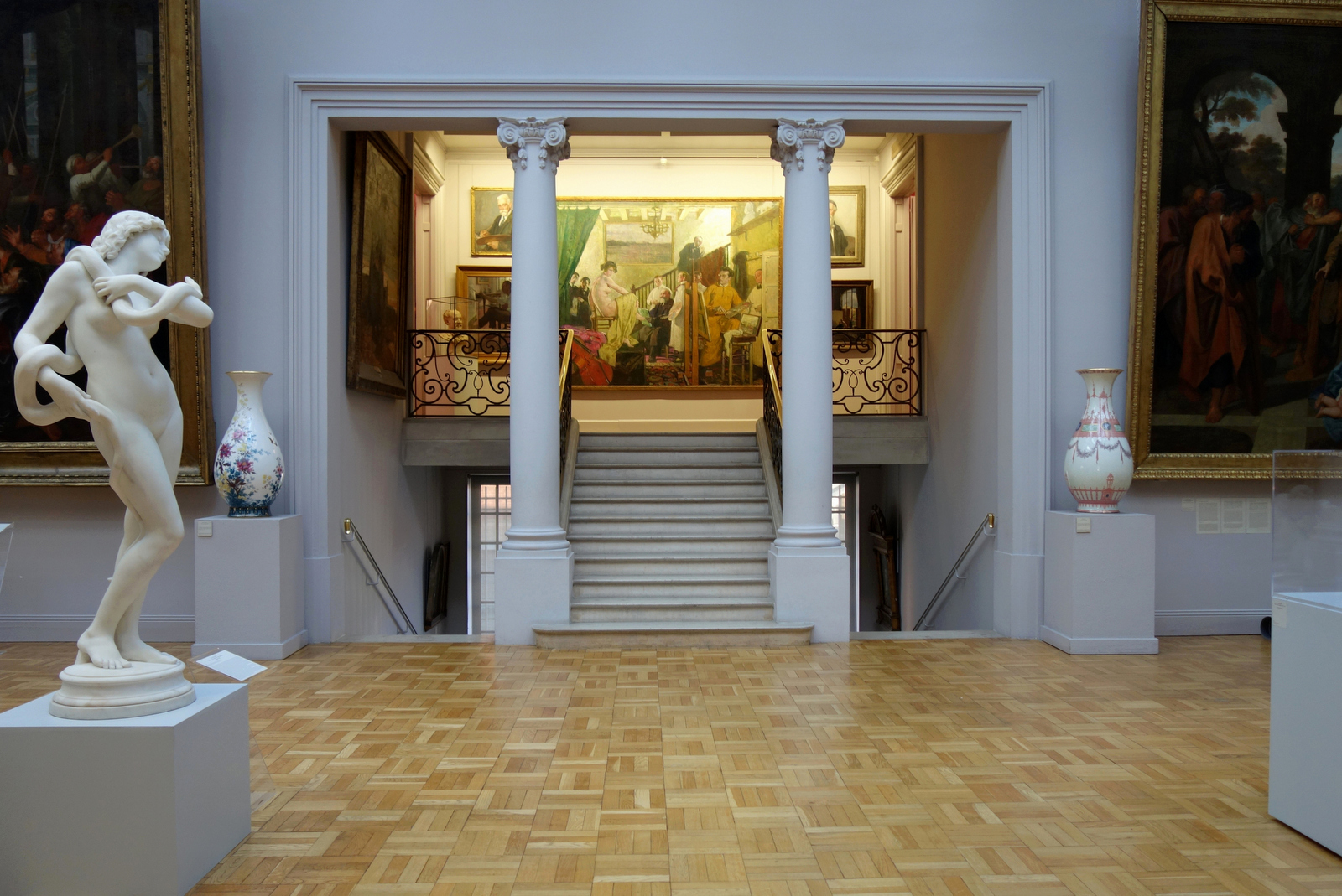 Musée Antoine-Lécuyer à Saint-Quentin.